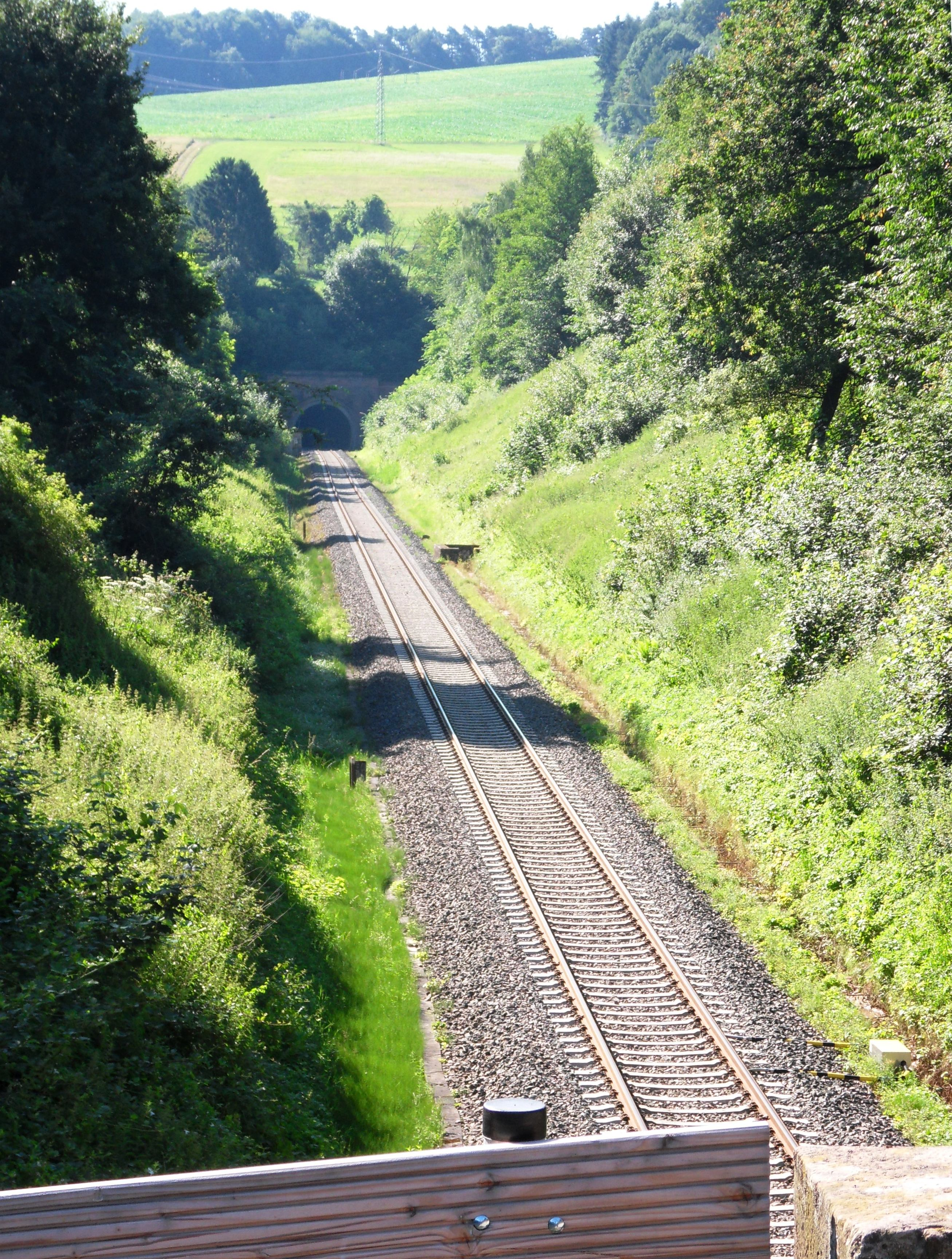 Geländeeinschnitt der Odenwaldbahn vor dem Nordportal des Frau-Nauses-Tunnels bei Frau Nauses